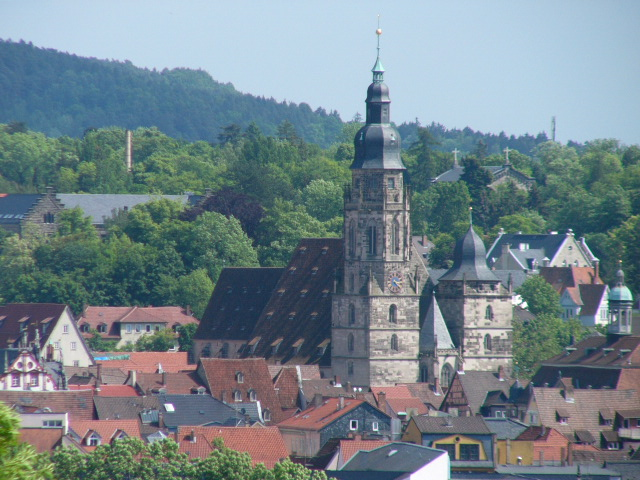 Moritzkirche vom Gelände der Fachhochschule aus fotografiert